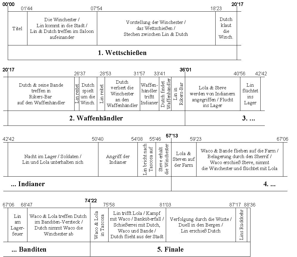 Sequenzgrafik einer Filmanalyse des Westerns Winchester 73